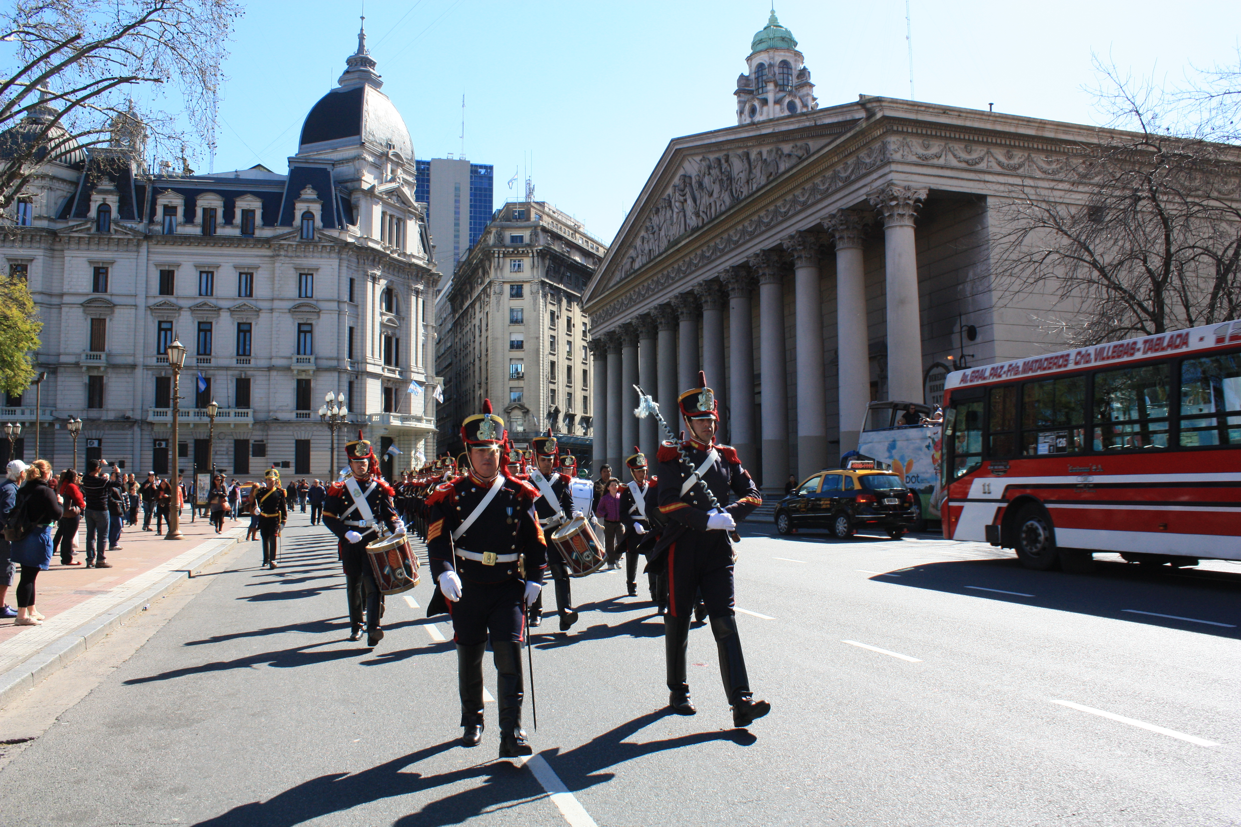 Catedral de la Ciudad de Buenos Aires